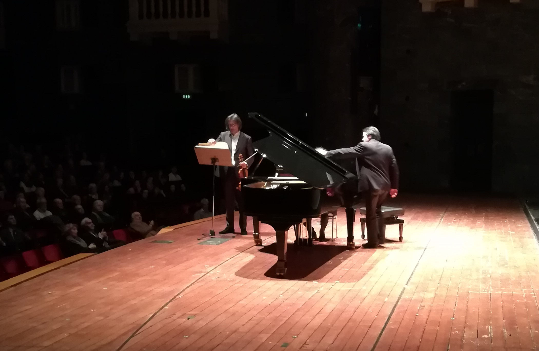 Leōnidas Kavakos, Enrico Pace, Teatro Carlo Felice, Genova, 11 febbraio 2019